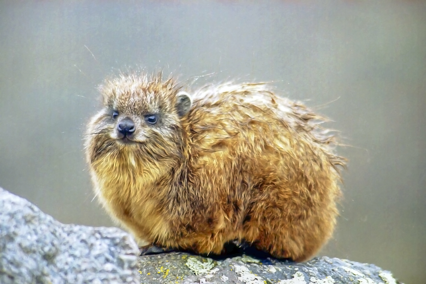 Klipdas (Hyrax) op Mount Kenya. De foto is genomen bij McKinders hut op 4300 meter.